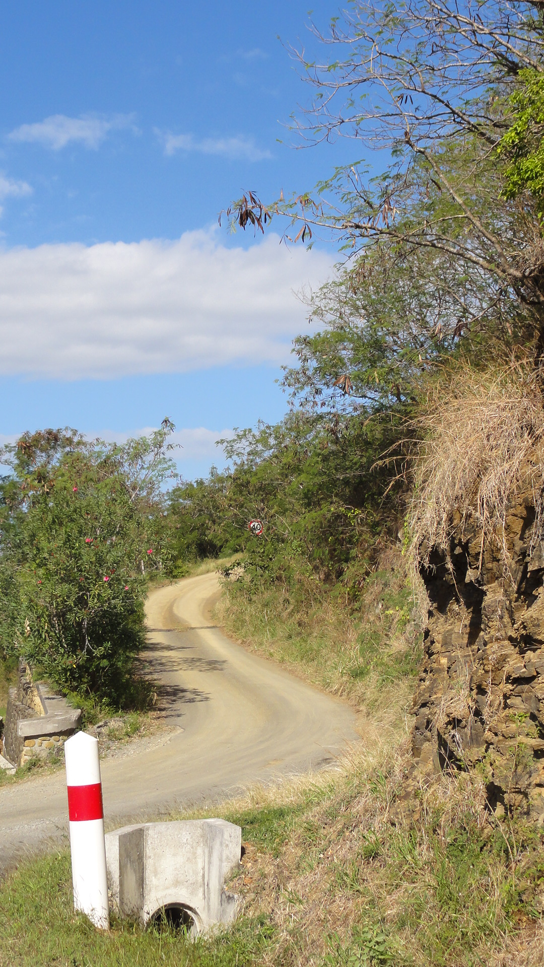 Accès Baie des Tortues